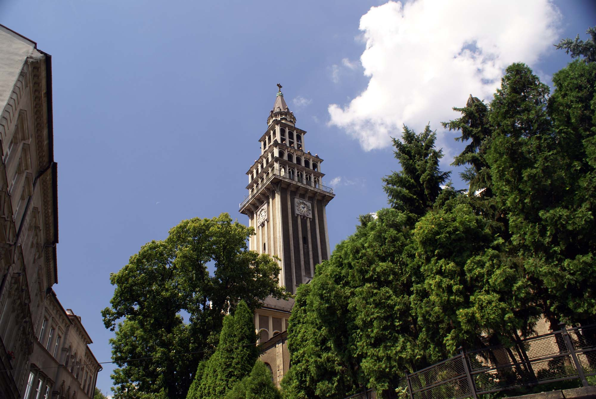 Bielsko-Biała, miasto w ramach dawnego historycznego założenia miejskiego